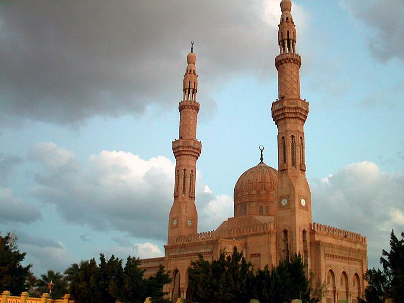 صورة لمسجد بو البدرية أحد أكبر مساجد بنغازي.